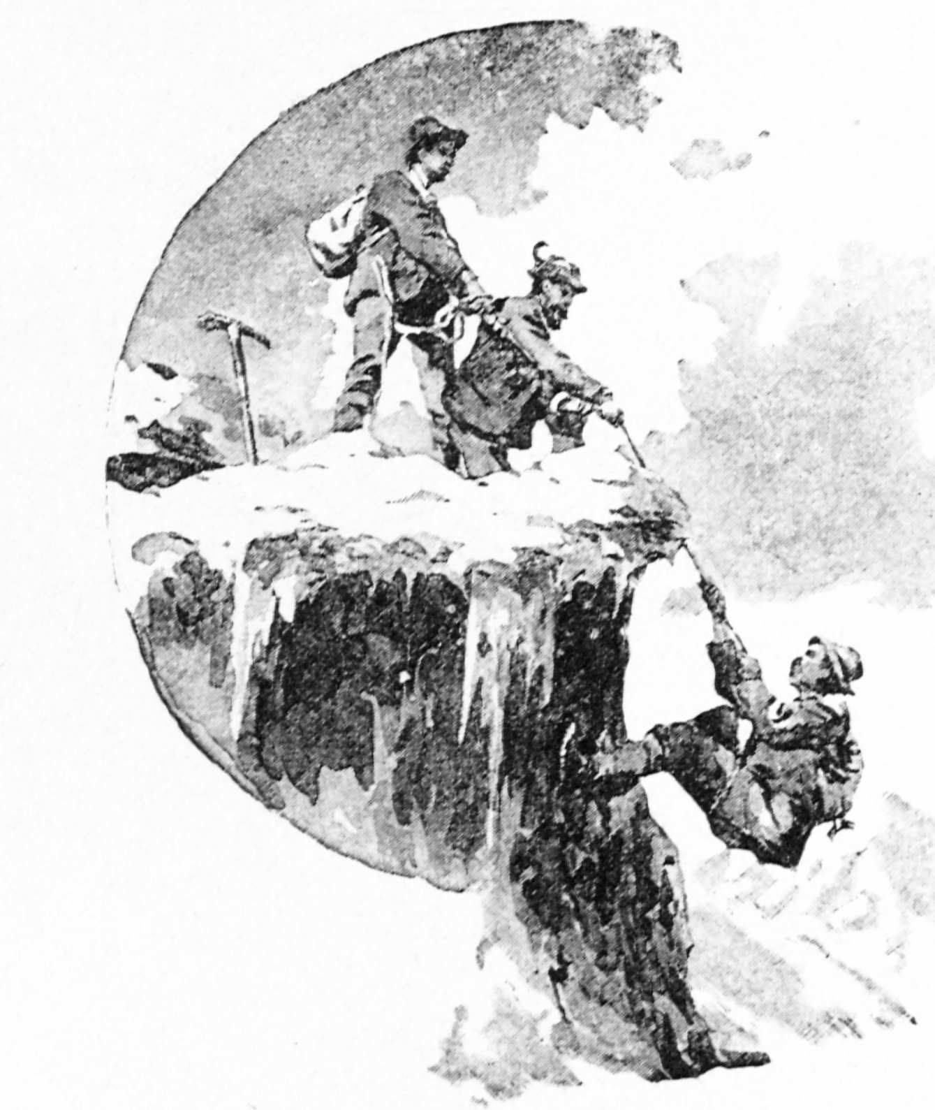 Tony Grubhofer ohne Titel (Aufstieg) 1899